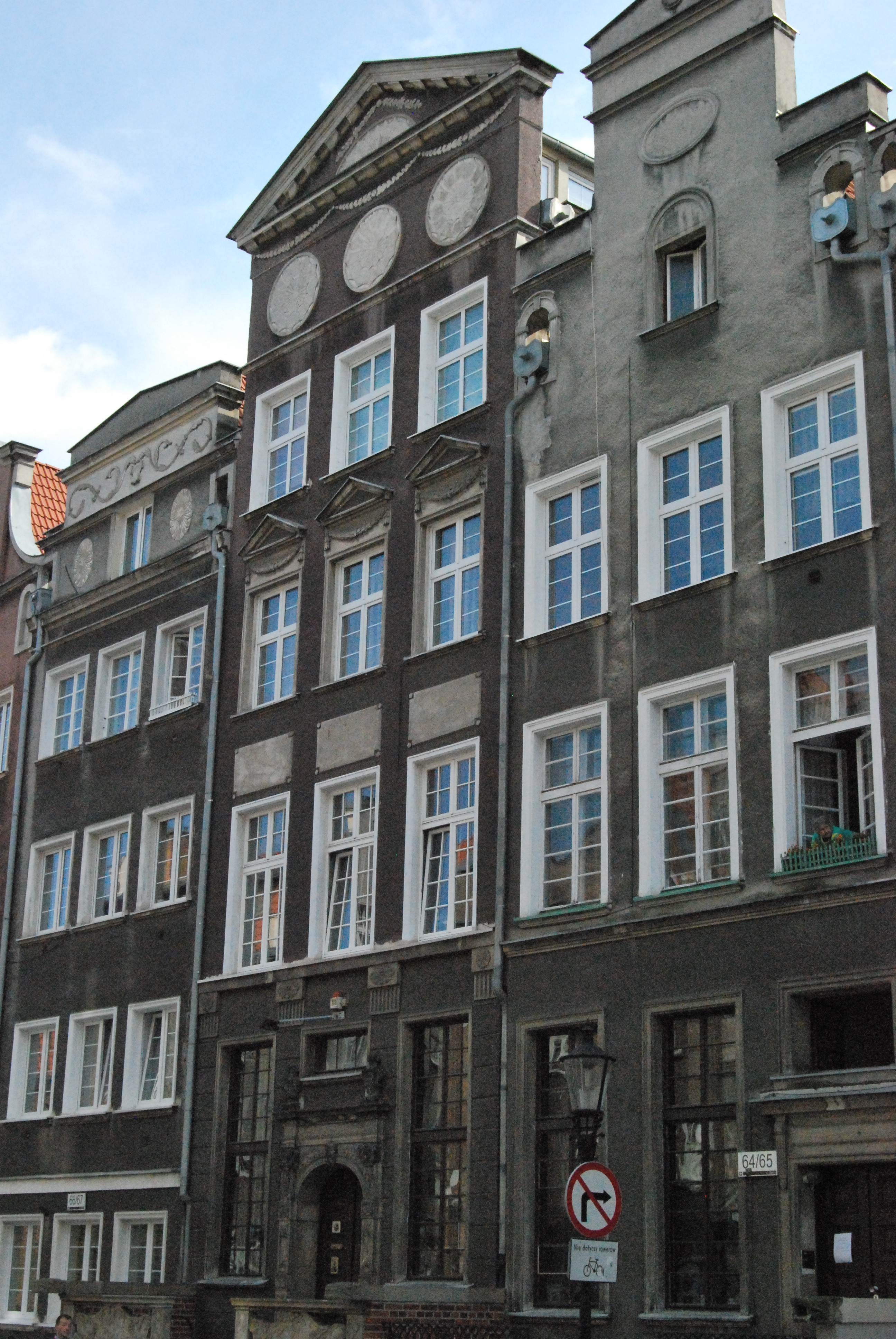 Gdańsk Główne Miasto - kamienica przy ul. Ogarnej 65